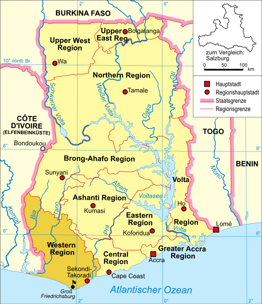 Politische Karte Ghanas (Western Region mit Groß Friedrichsburg hervorgehoben)